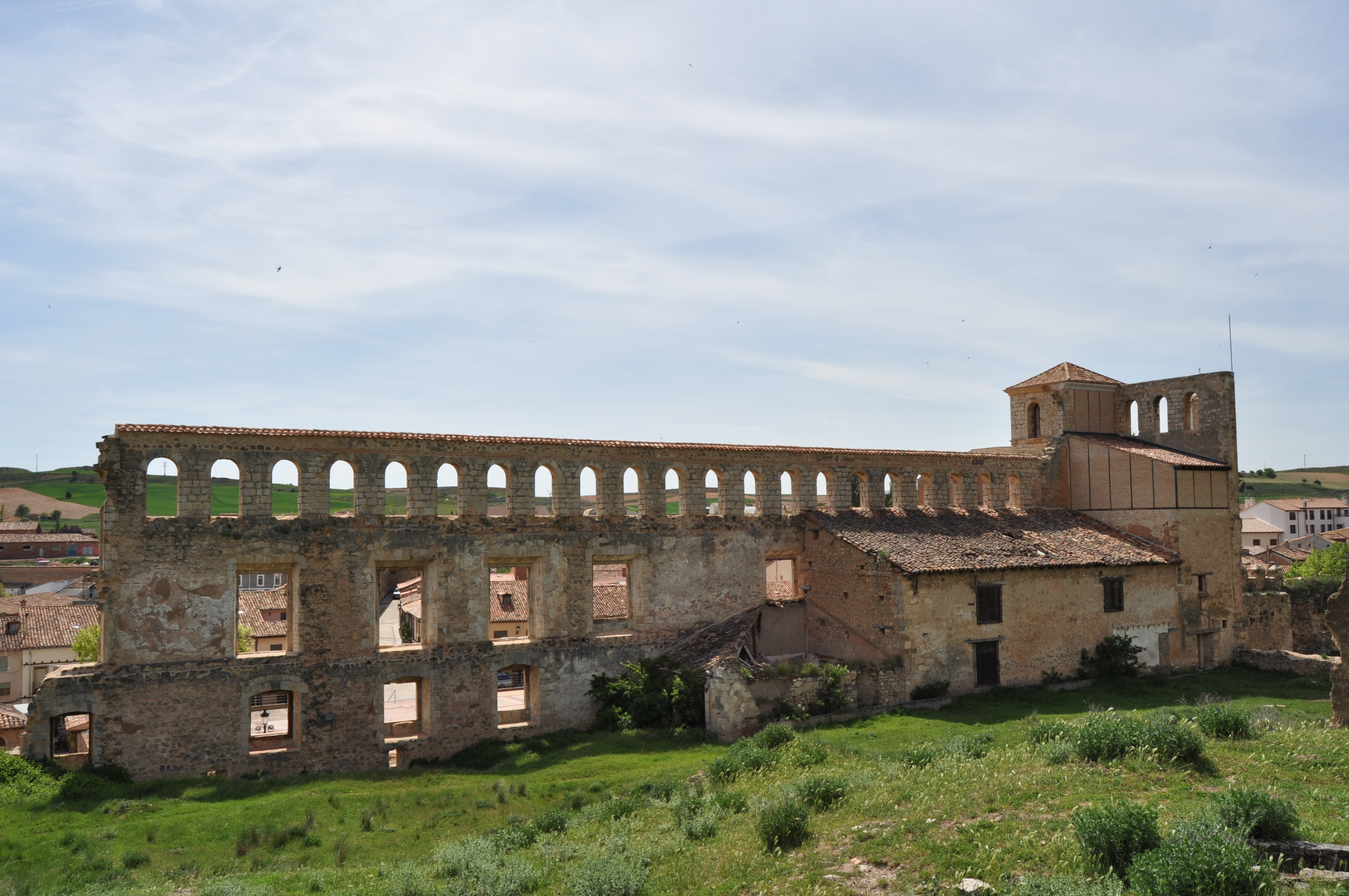 Berlanga de Duero - 025